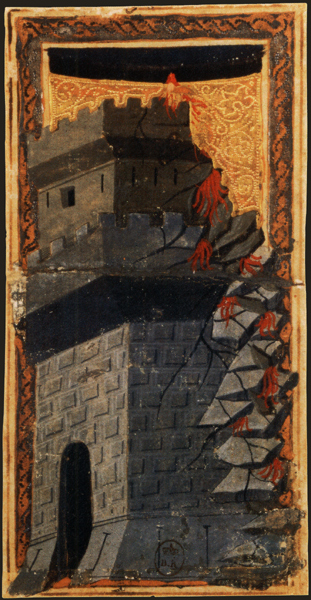 Charles VI (or Gringonneur) Deck; Le tarot dit de Charles VI